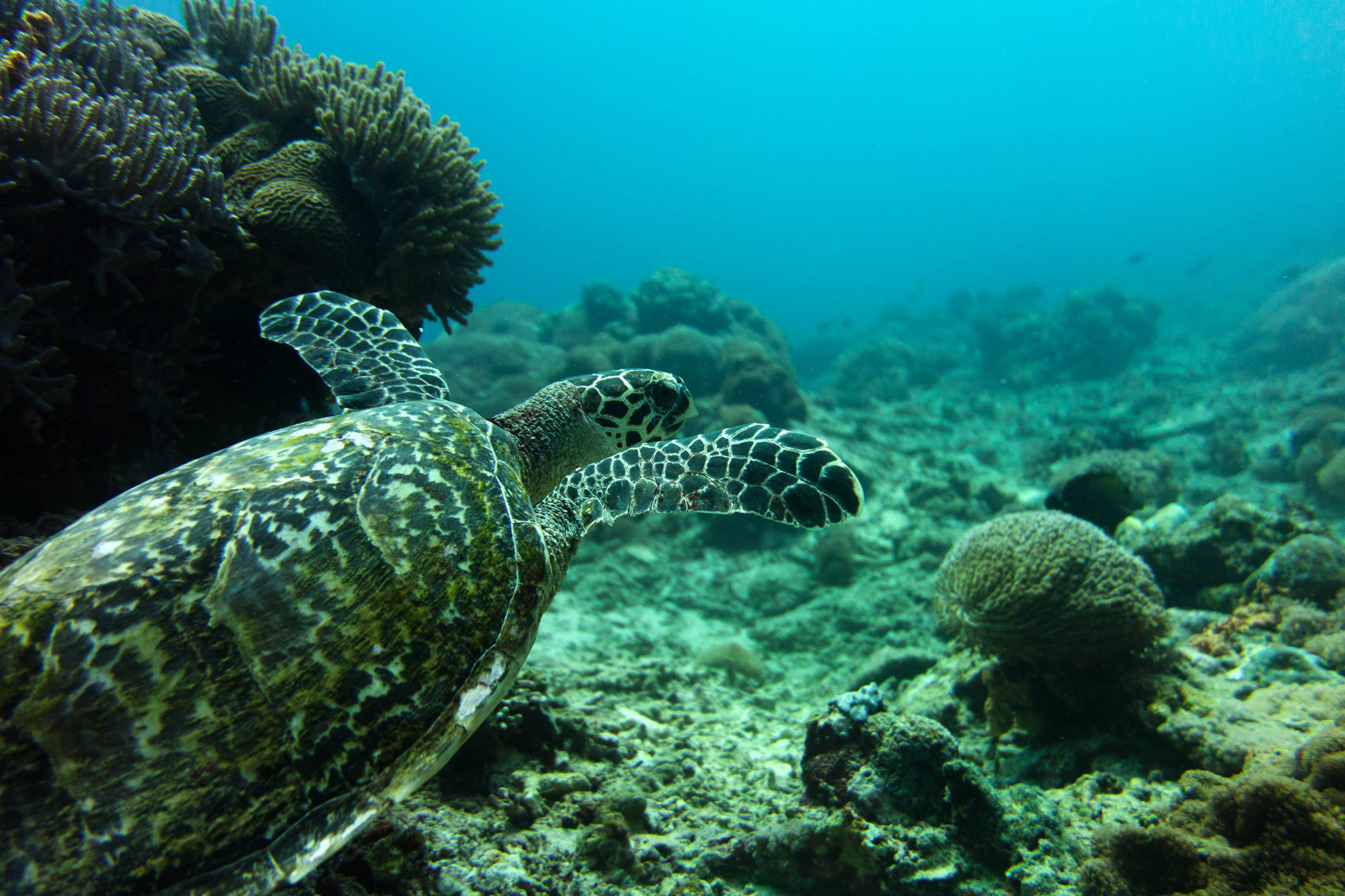 Diving near Nusa Penida